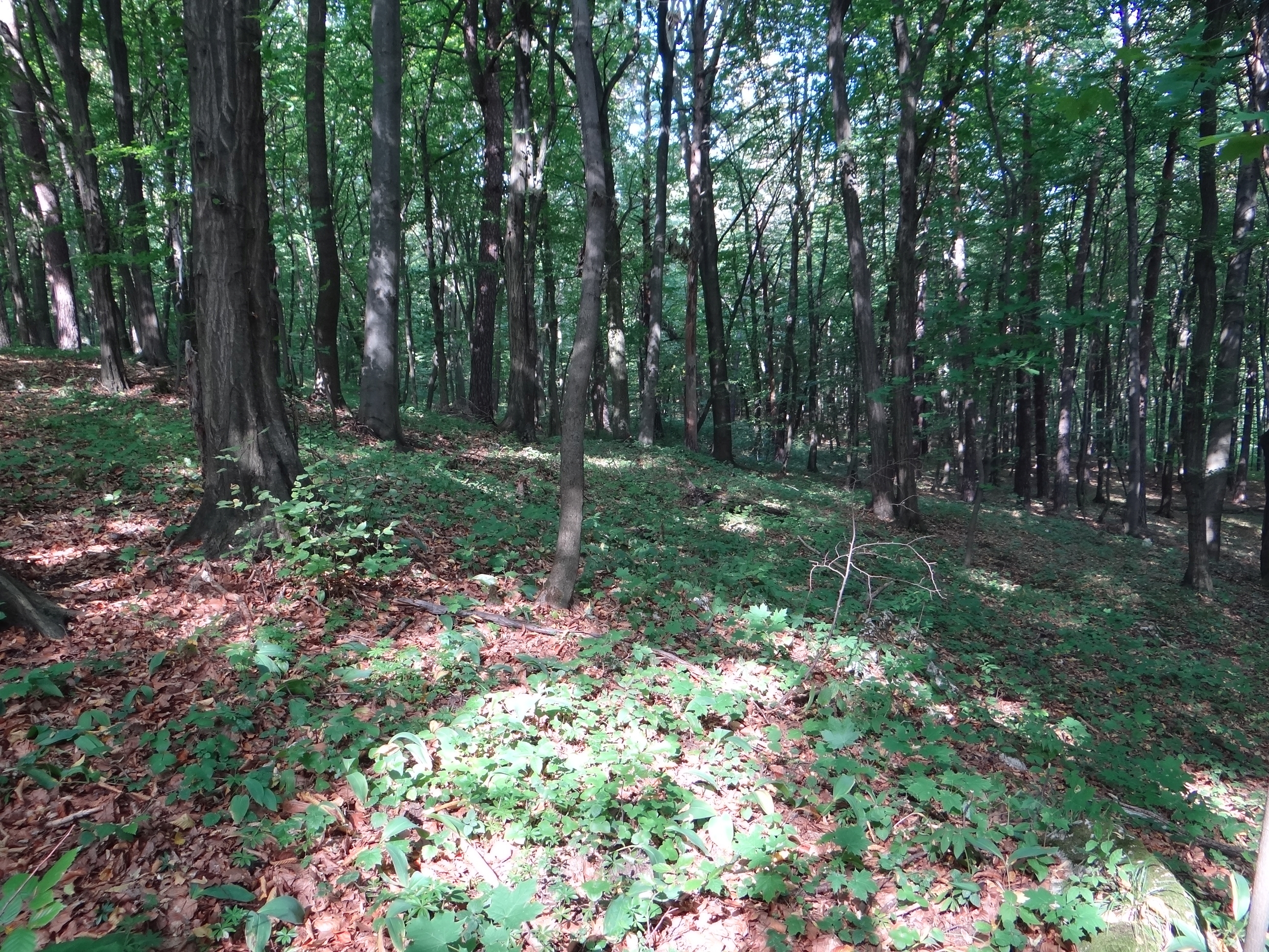 Grąd w rezerwacie przyrody Zielona Góra koło Częstochowy